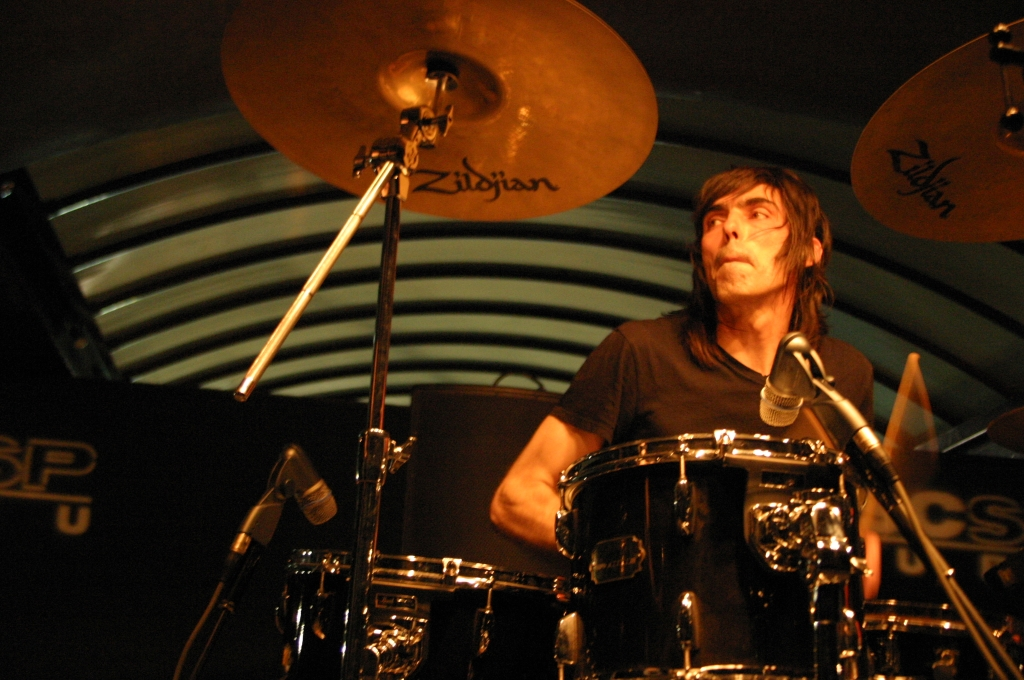 Todd Trainer, en concert avec Shellac à Sao Paulo le 1er avril 2008